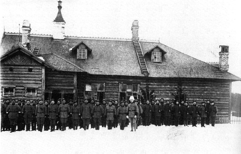 Полк Северной Ингрии в Кирьясало, зима 1920 г. Впереди командир полка Юрье Эльфенгрен.